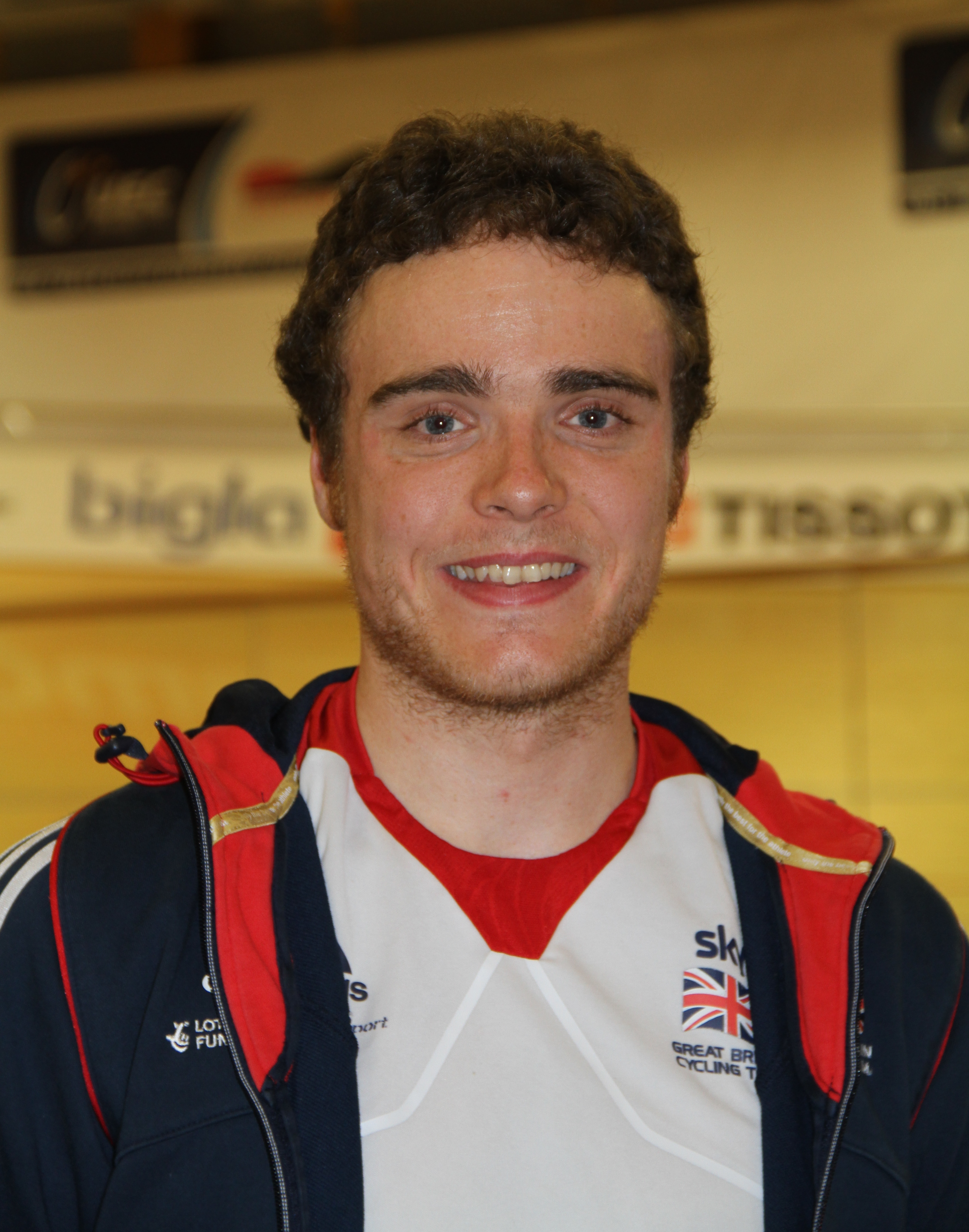 Steven Burke, britischer Radsportler The making of this document was supported by the Community-Budget of Wikimedia Germany.